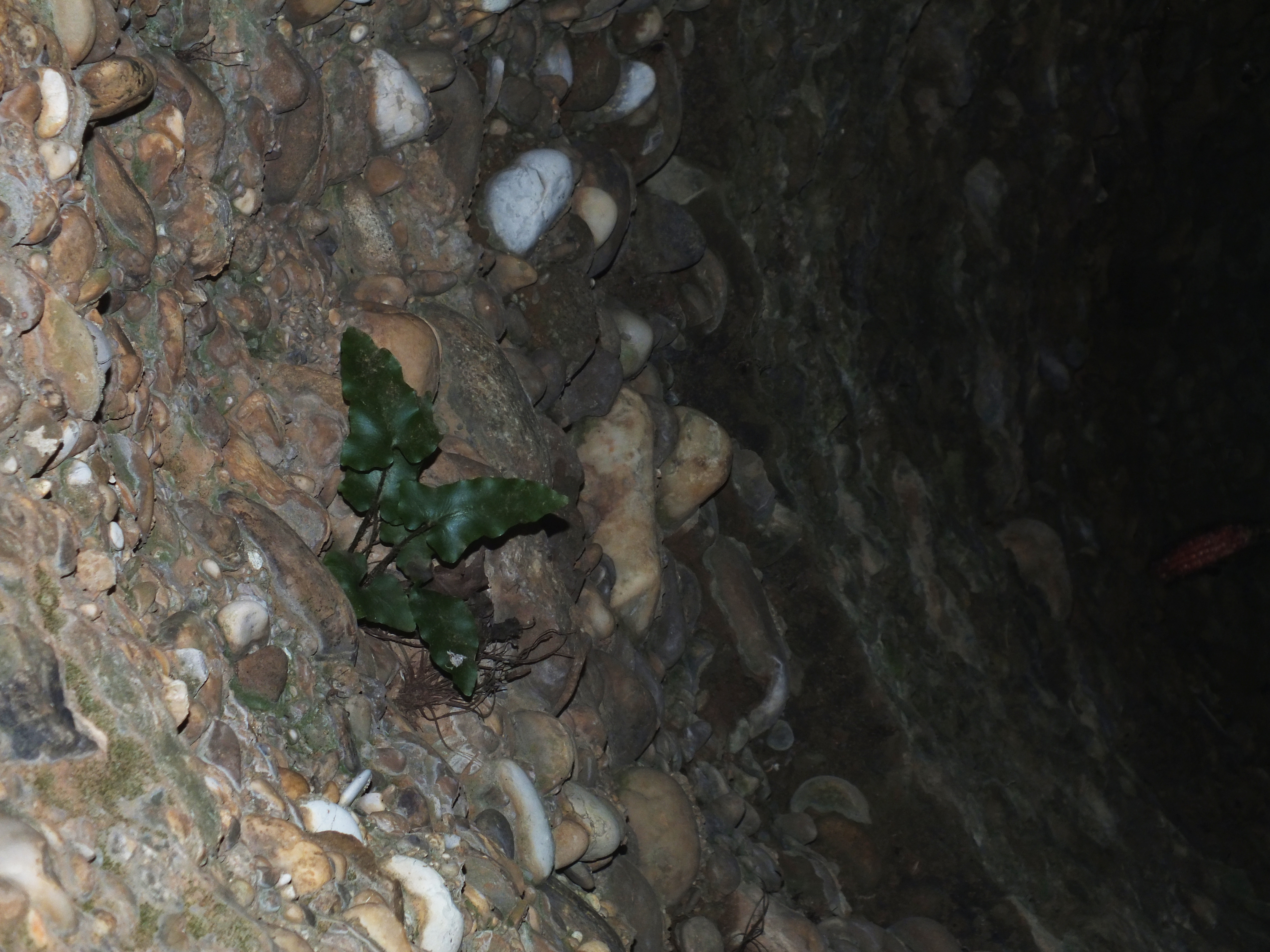 Asplenium sagittatum dans un puit, Peau de Meau, Crau (France)